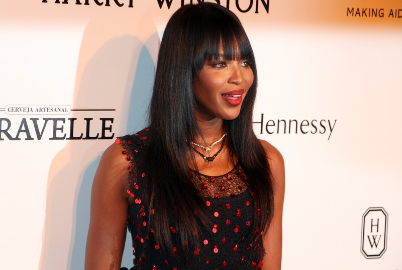 4 - Naomi Campbell-002